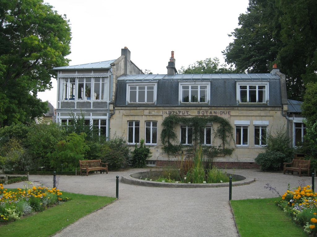 Institut botanique du jardin des plantes de Caen, construit par étapes entre 1891 et 1898.